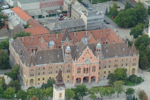 Kecskemét Hungary, aerialphotography